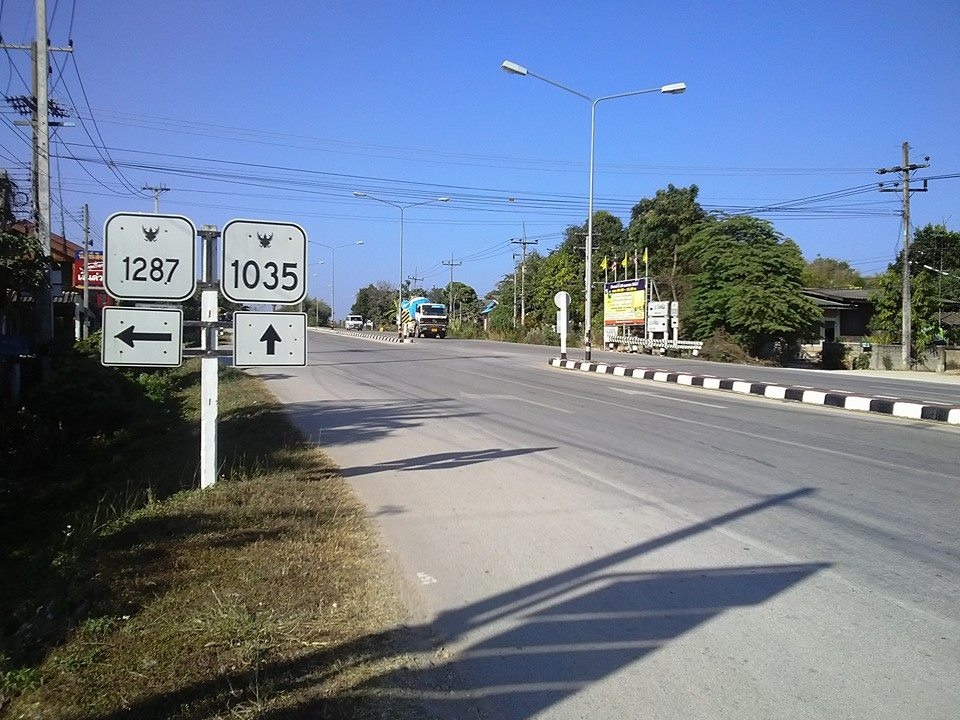 ทางหลวงแผ่นดินหมายเลข 1035 ตอน แจ้ห่ม-ร่องเคาะ